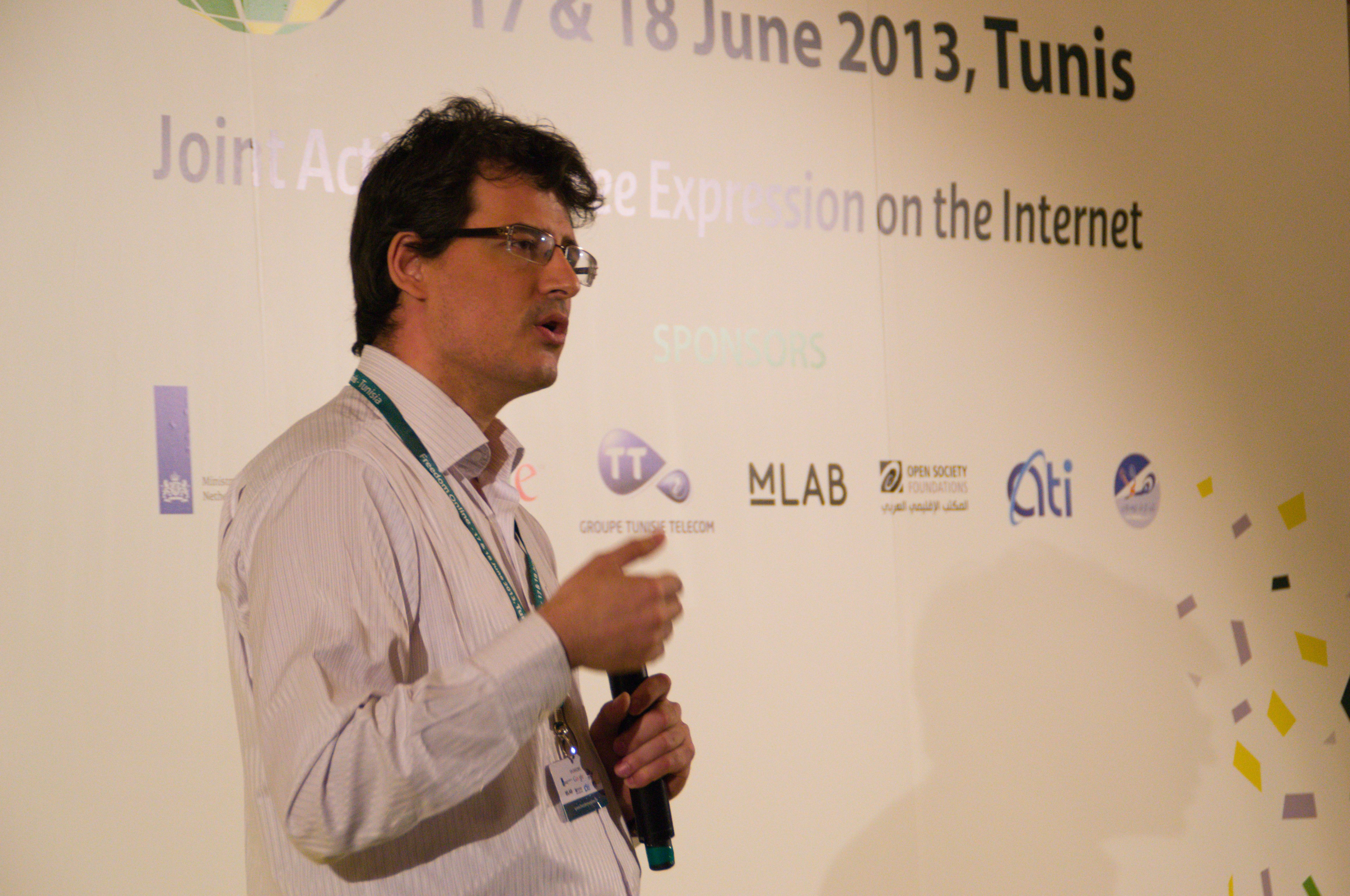 Directeur de l'Agence tunisienne de l'Internet à la troisième conférence Freedom Online à Tunis